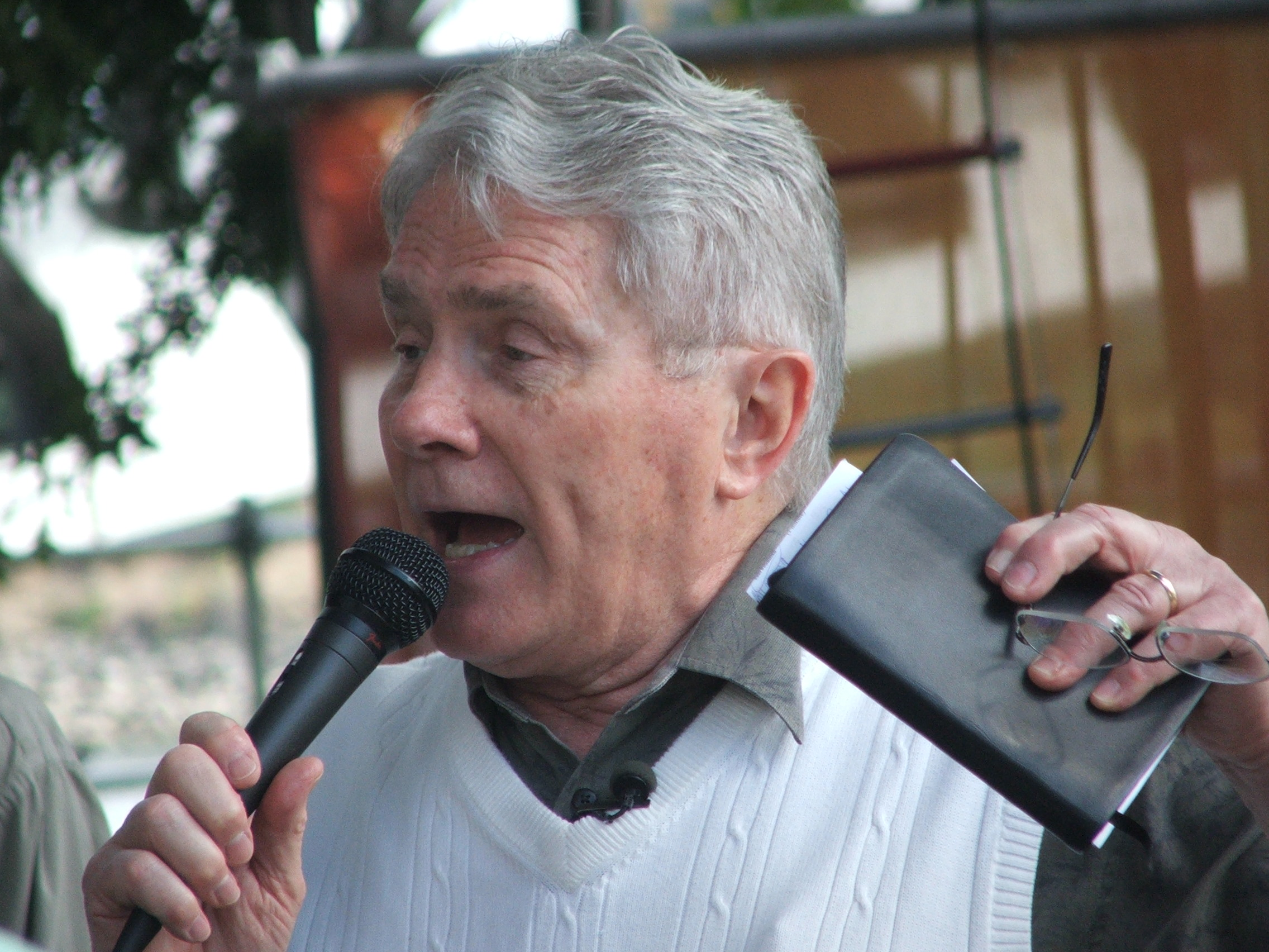 Luis Palau in 2008